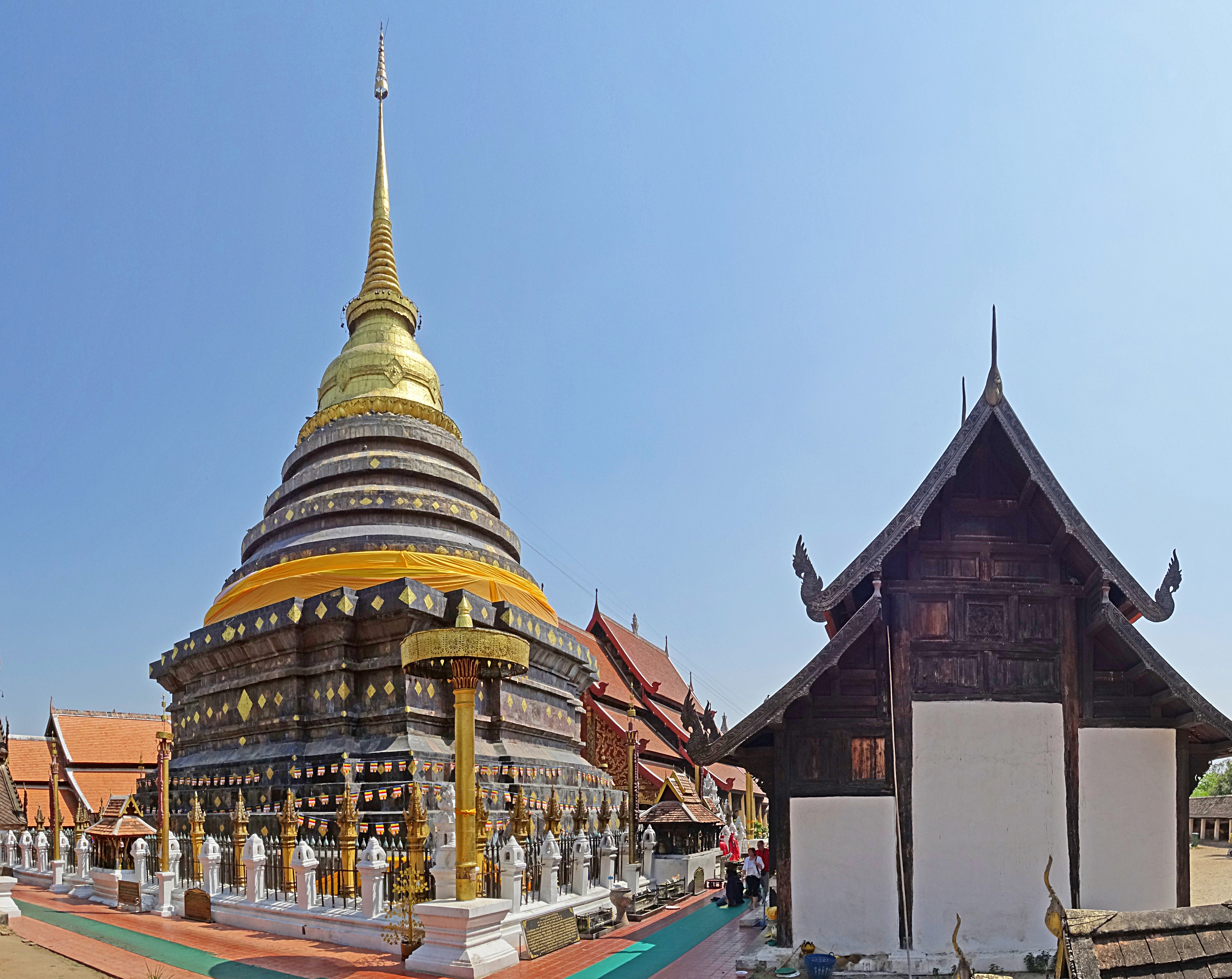 heiliger Chedi mit vielfach gegliederter Basis im Wat Phrathat Lampang Luang